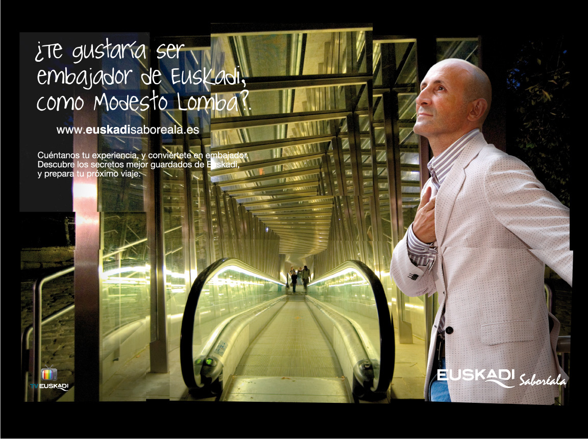 Martín Berasategui, Modesto Lomba, Edurne Pasaban y Miguel de la Quadra-Salcedo se convierten en 'Embajadores de Euskadi'